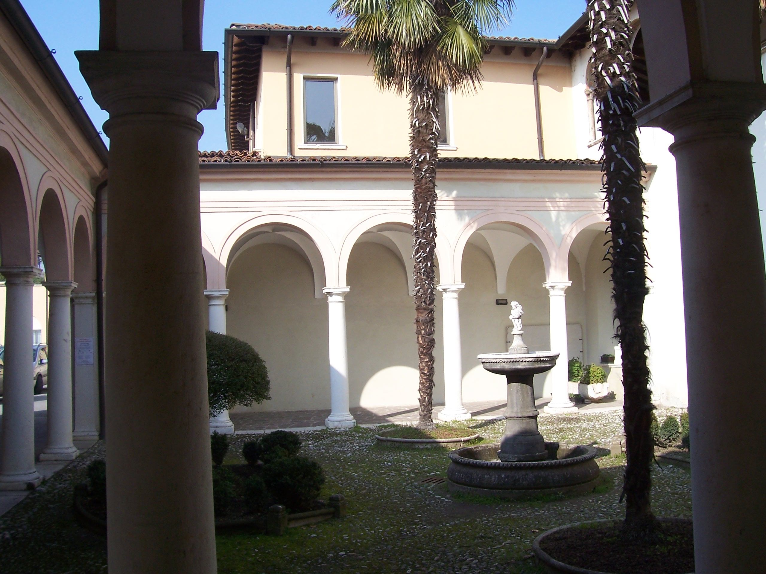 Santissimo corpo di cristo brescia chiostro piccolo.jpg